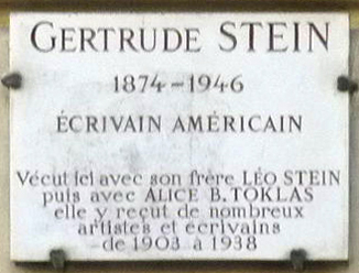 27 rue de Fleurus, Paris, où vécut Gertrude Stein